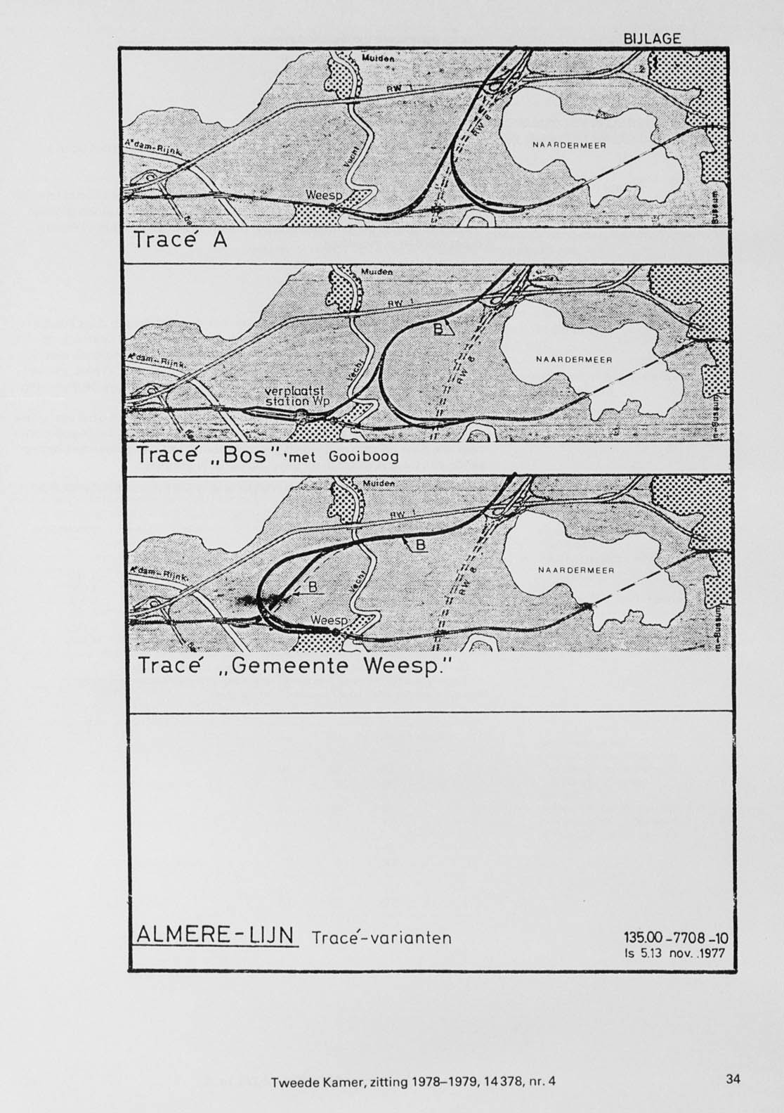 Bijlage bij nadere informatie betreffende de trac-varianten "A", "Bos met Gooiboog" en "Gemeente Weesp" voor aansluiting van Almere en Lelystad op het Nederlandse spoorwegnet